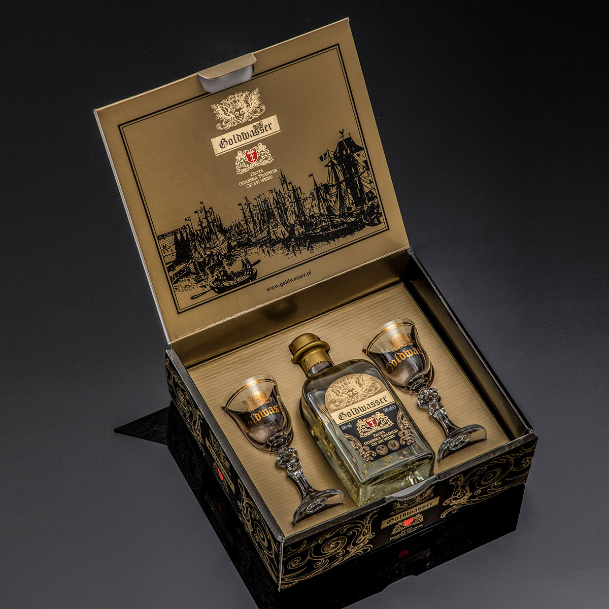 Tradycyjny, gdański likier ziołowo-korzenny z płatkami najprawdziwszego 24-karatowego złota, wytwarzany według oryginalnej, XVI wiecznej receptury